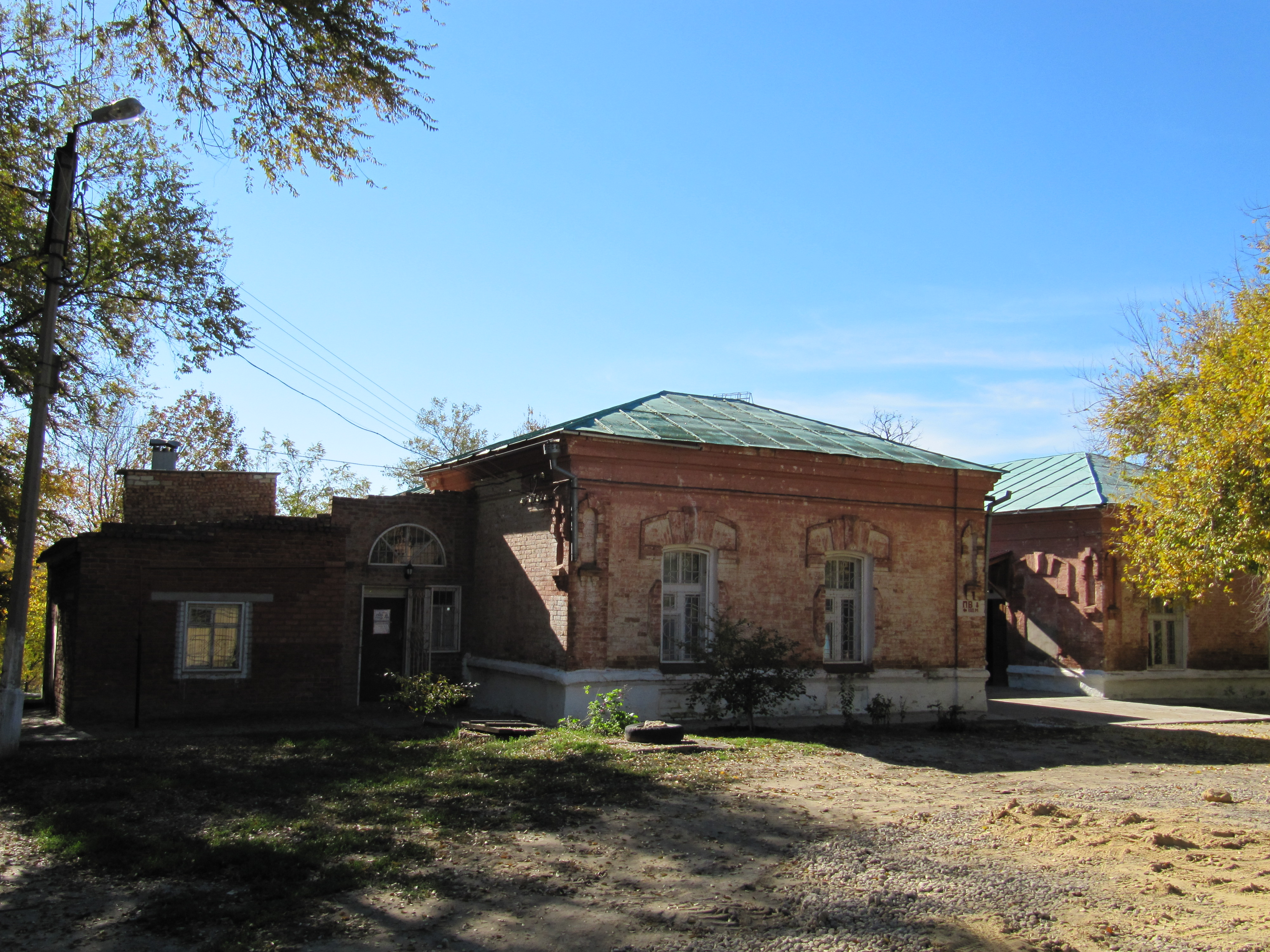 Красная школа Т.Д. Юрковой: улица Ленина, 201А, Элиста, Калмыкия